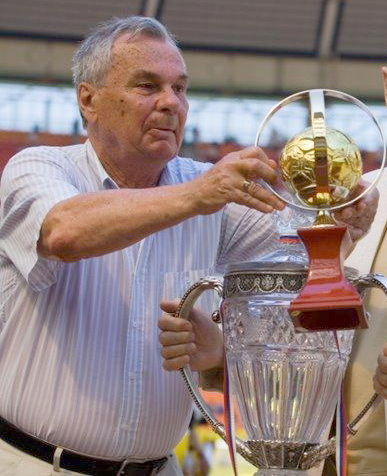 Valentin Kozmich Ivanov